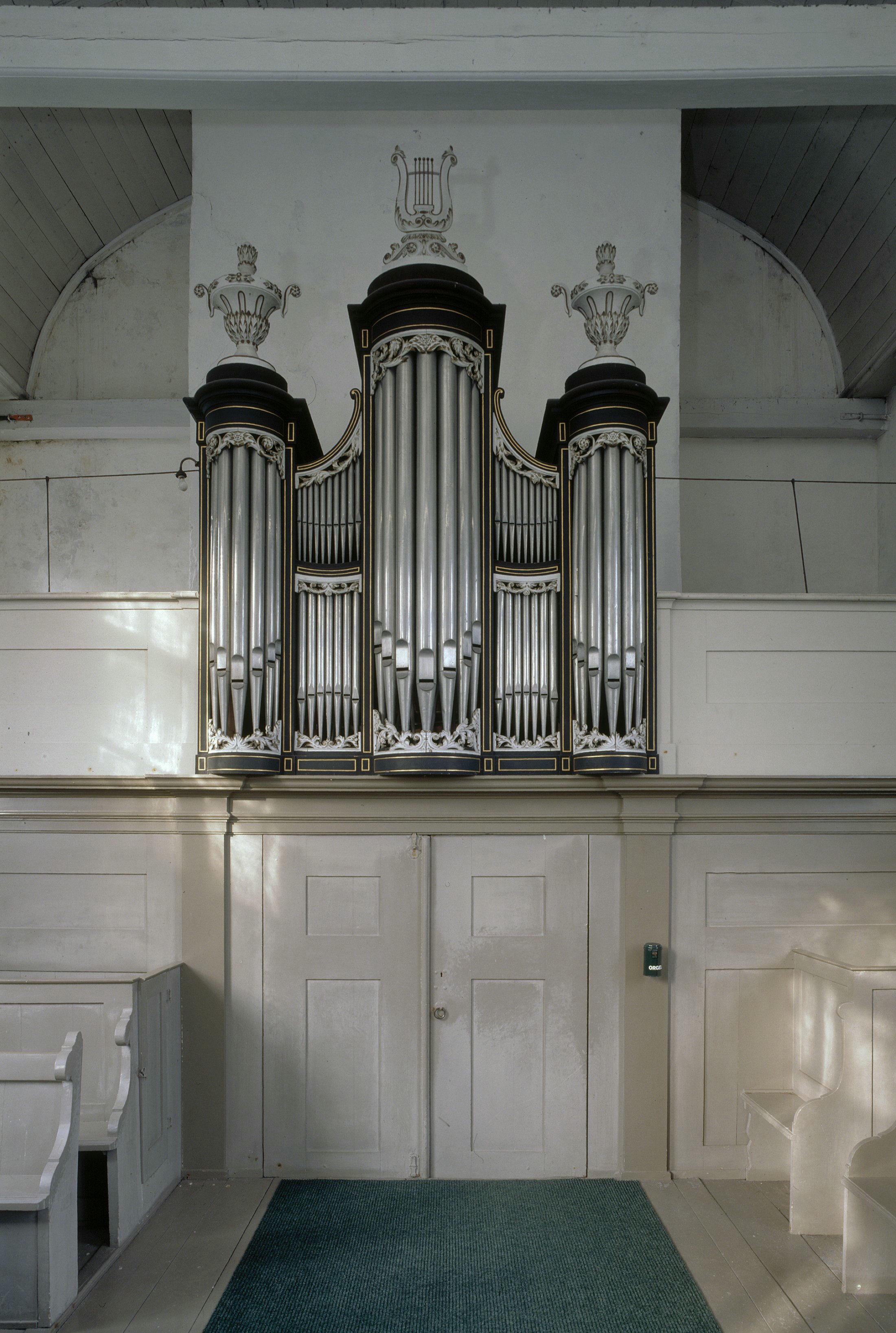 Nederlands Hervormde Kerk: Interieur, aanzicht orgel, orgelnummer 359 (opmerking: Gefotografeerd voor Het Historische Orgel in Nederland 1840-1849, bladzijder 321)